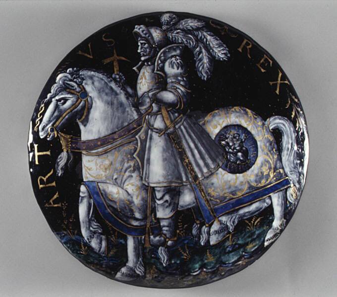 French, Limoges; Medallion; Enamels